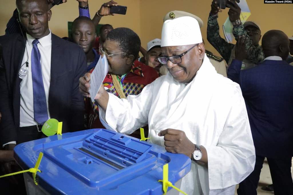 Bamanankan: Mali Jamana Tigui IBK Tara Aka kalata